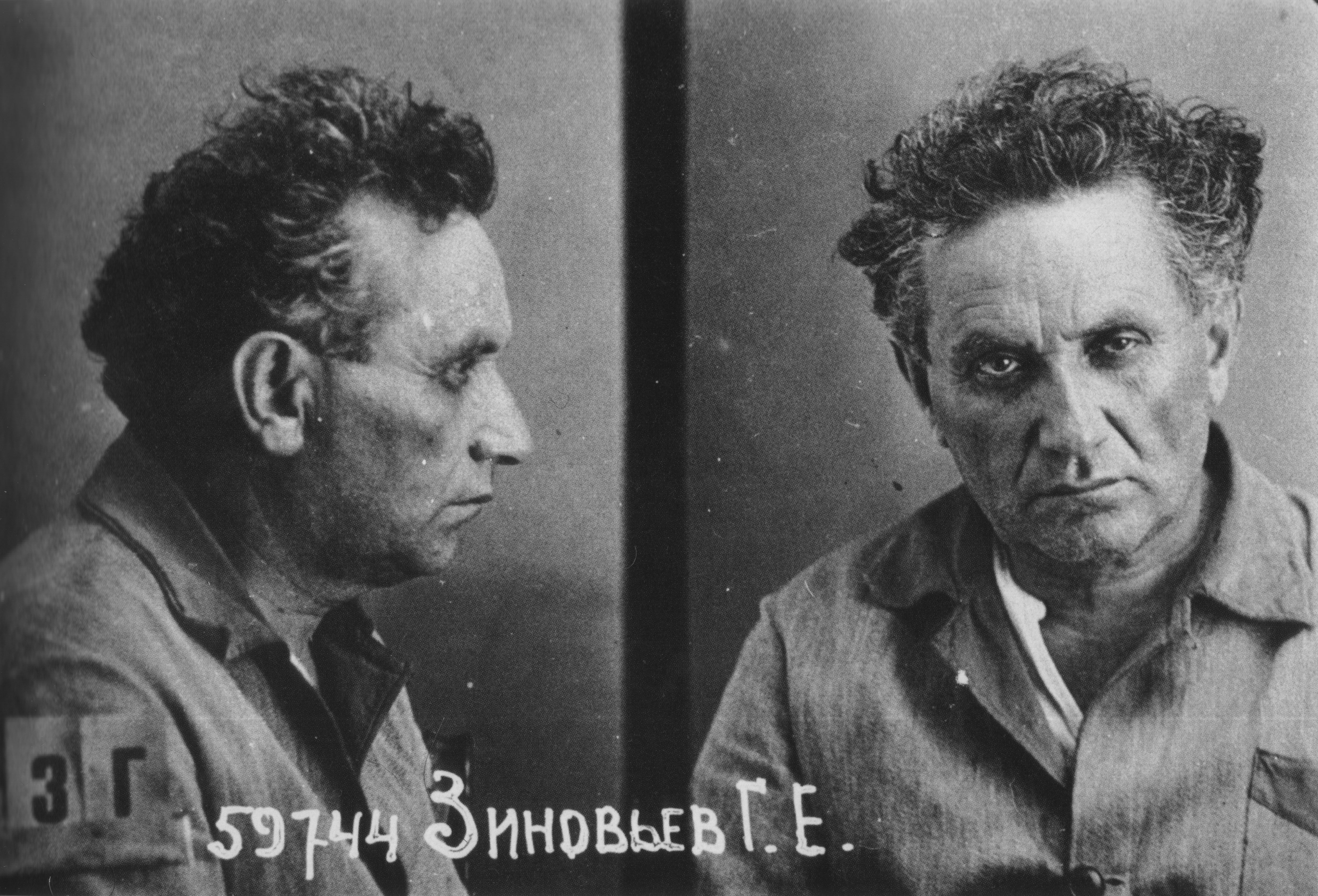 Fotografías de la ficha policial de Grigori Zinoviev tras su arresto por el NKVD en 1934, para ser juzgado en el Primer Juicio de Moscú.